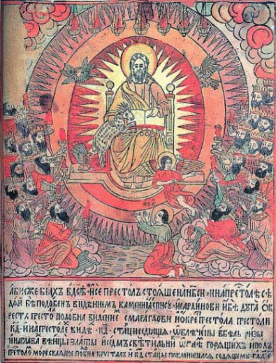 Lubok engraving of Apocalypse, from The Koren Picture-Bible (1692-1696) Василий Корень. Апокалипсис. Лист 1, главы 4, 5. 1692-1696 гг.